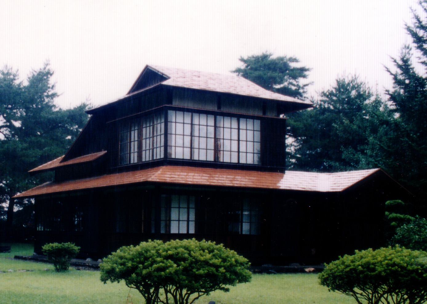 Rasu Chijin kyokai, Iwate, Japan